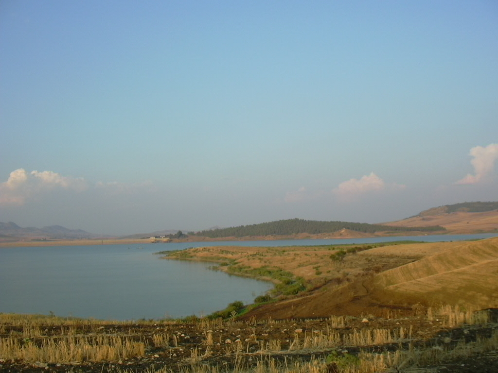 Aidone (EN_Sicilia): Lago di Ogliastro, invaso artificiale del fiume Gornalunga